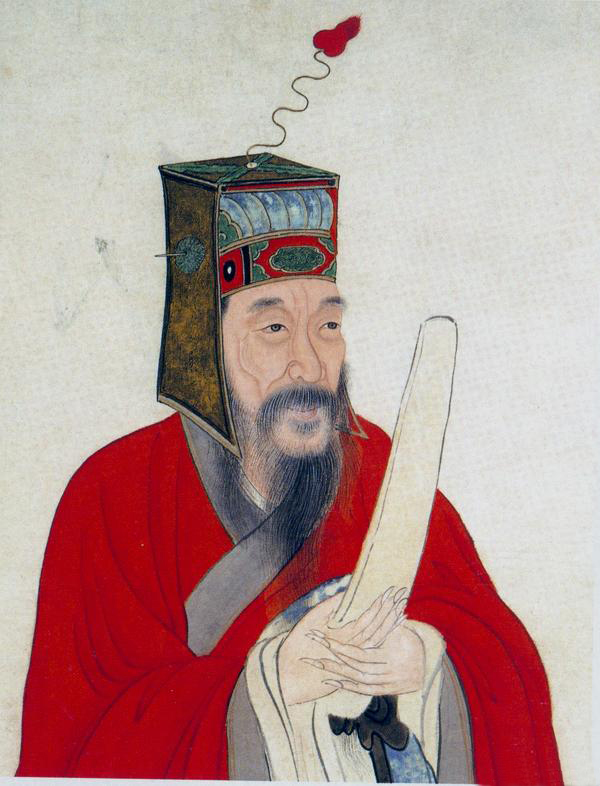 中文（香港）: 明代寫實容像